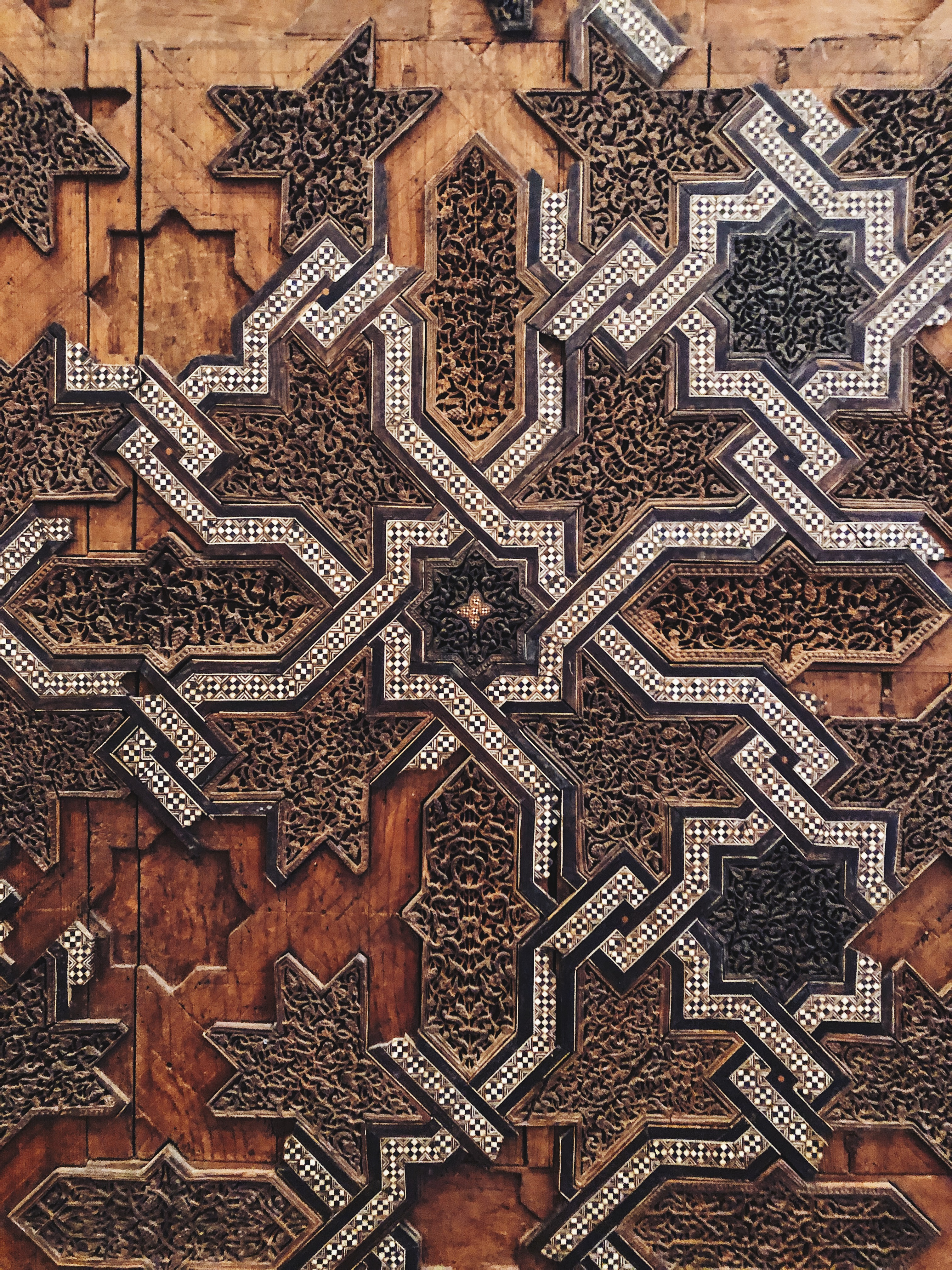 المنبر المرابطي الذي صنع في قرطبة عام 1137 بطلب الأمير علي بن يوسف بن تاشفين لمسجده الجامع في العاصمة المرابطية مراكش